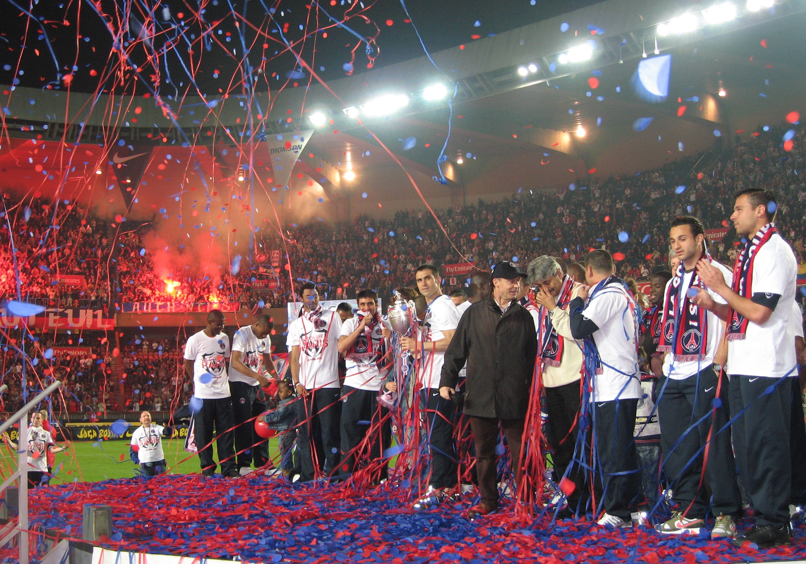 Fête Coupe de France / 6 mai 2006